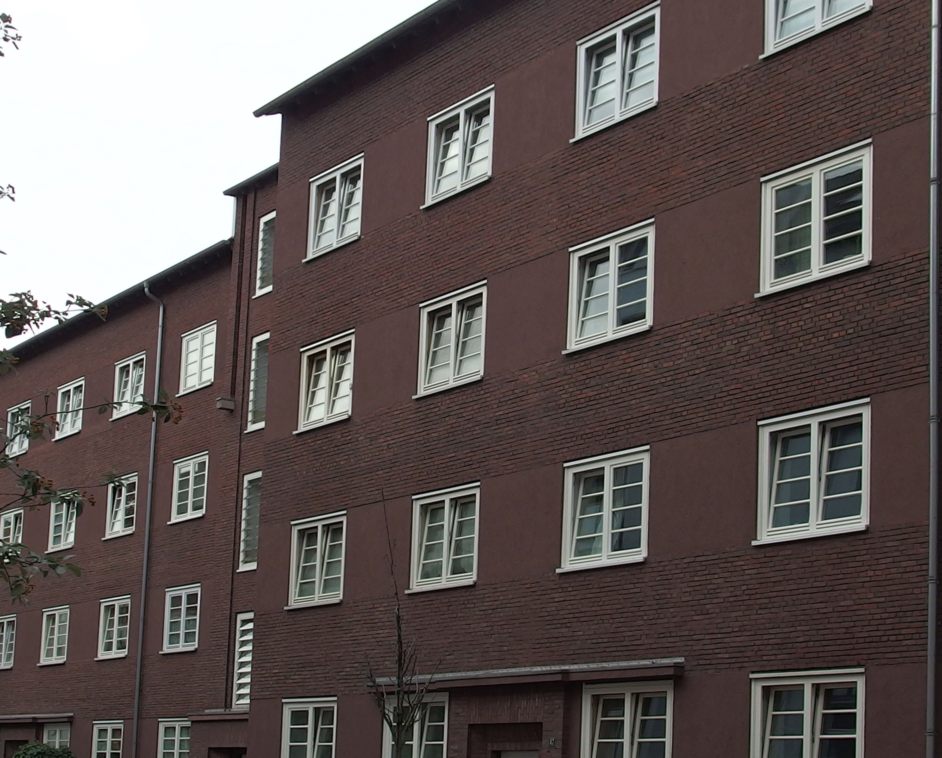 Wohnbebauung Eulerhof in Düsseldorf-Flingern, Fassadenausschnitt an der Degerstraße